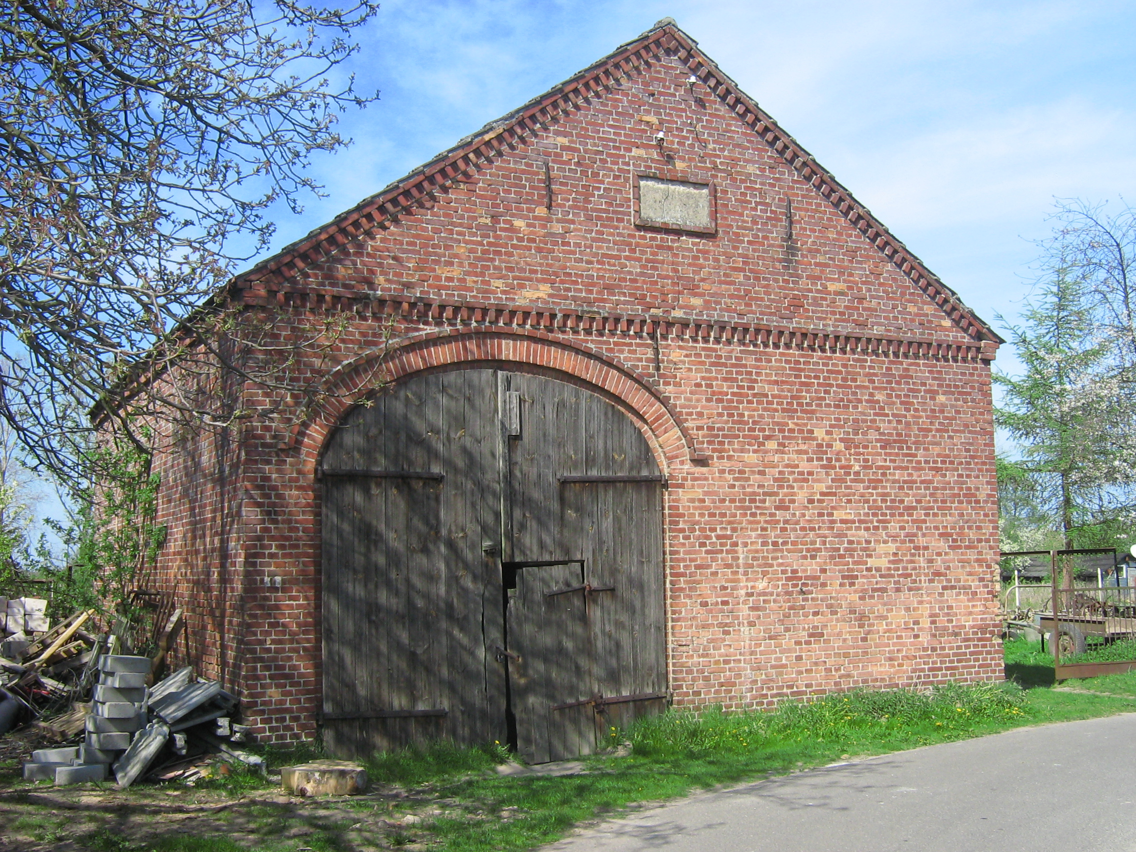 Stodoła w Sierosławiu